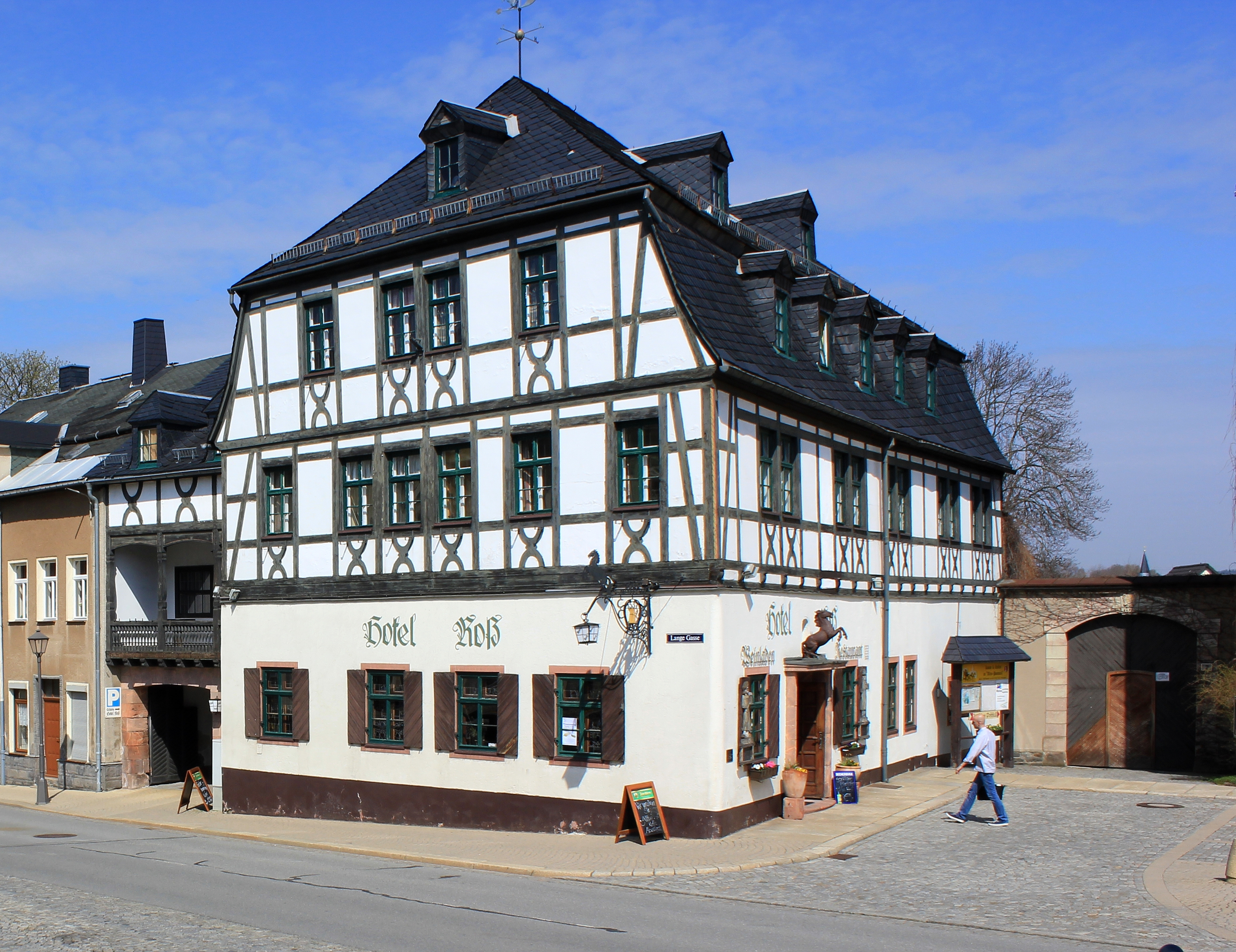 Fachwerkhaus. Zwönitz. Lange Gasse.Erzgebirge. Sachsen.